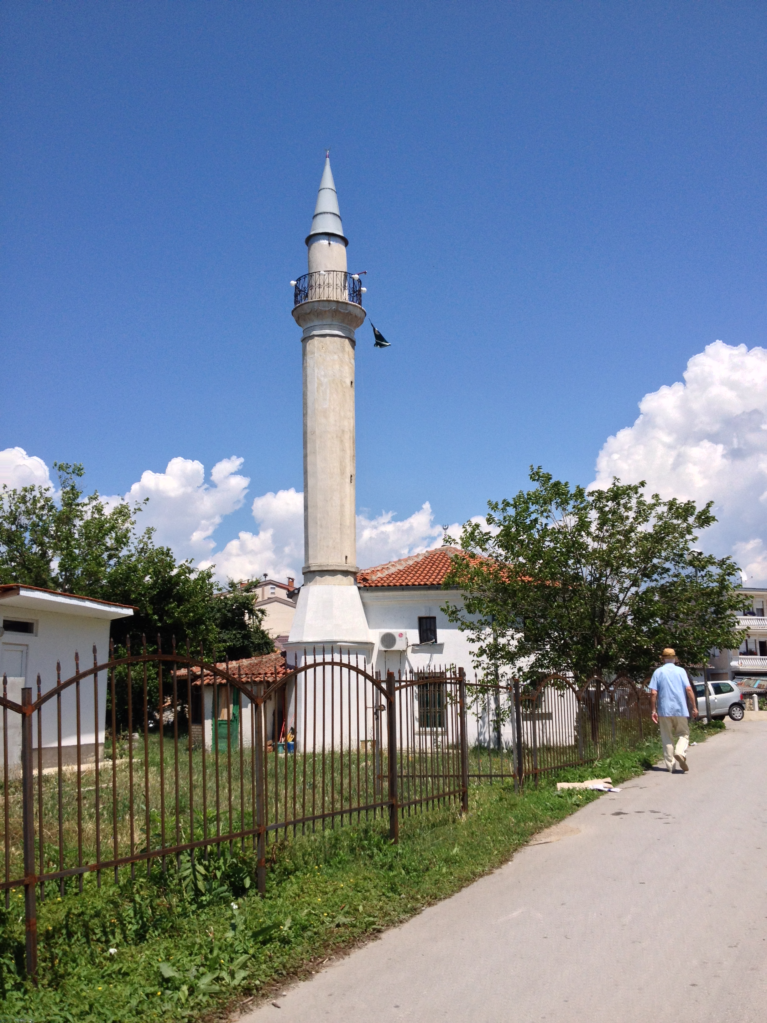 Die Emin-Mahmud-Moschee in Ohrid, Mazedonien